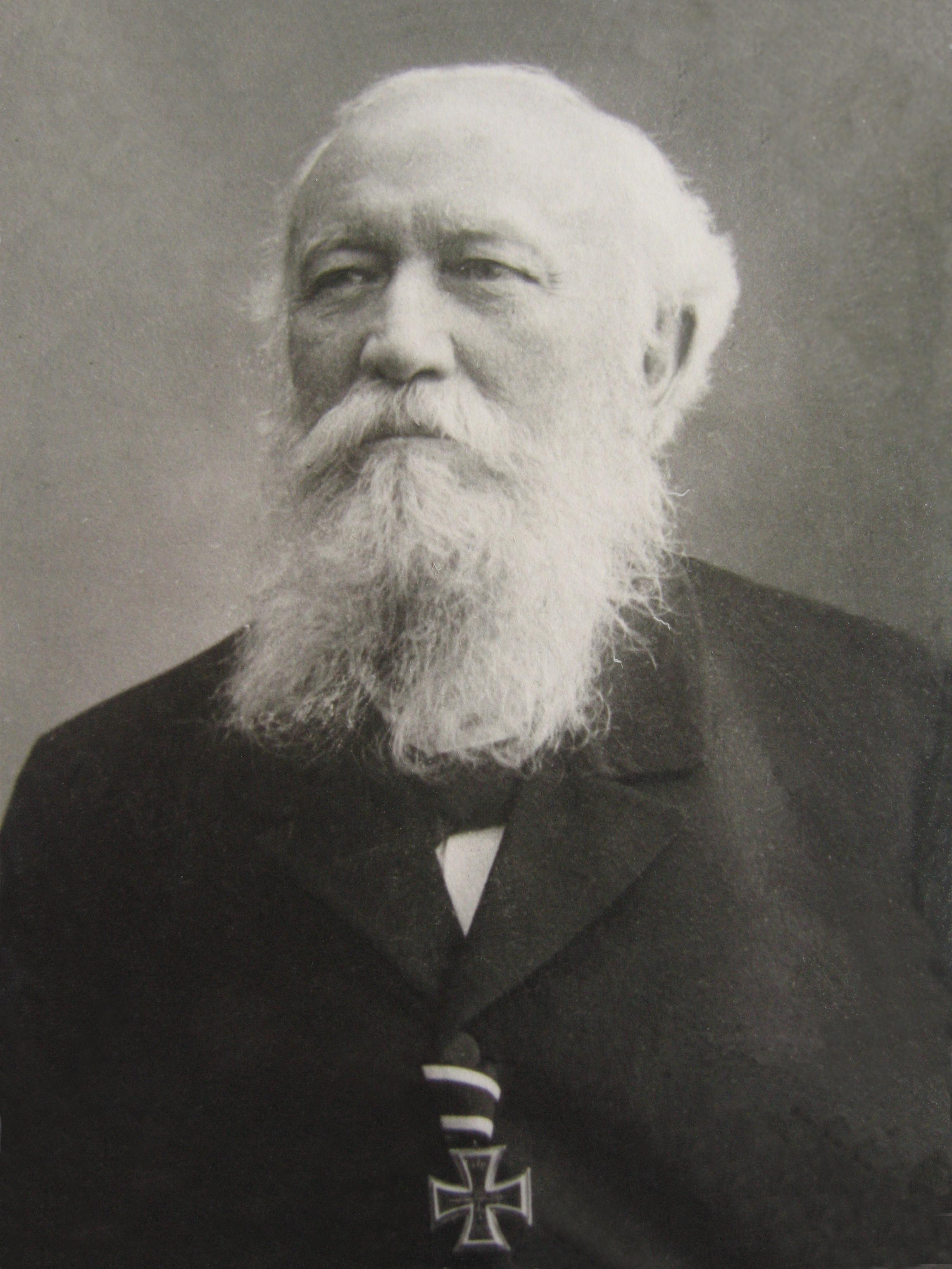 Familien-Photo von Peter Spohr im hohen Alter